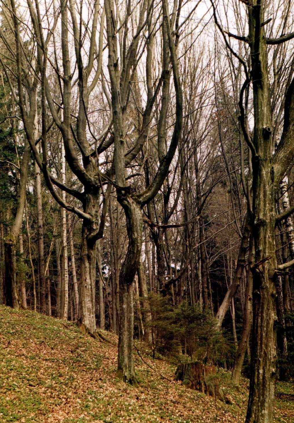 Autor: Adrian Grzegorz Rok wykonania: 2002